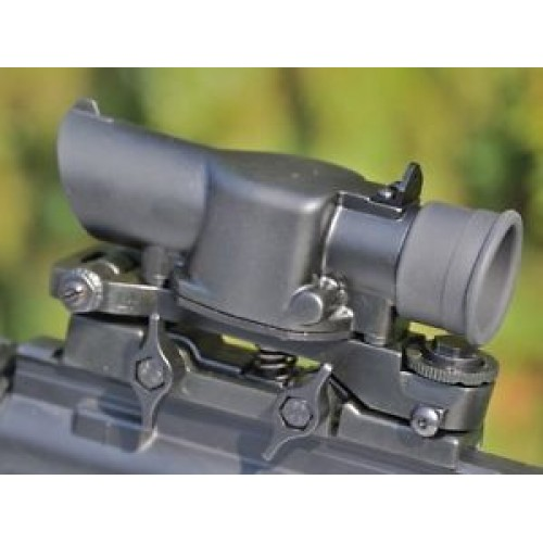 SUSAT sur une arme à feu